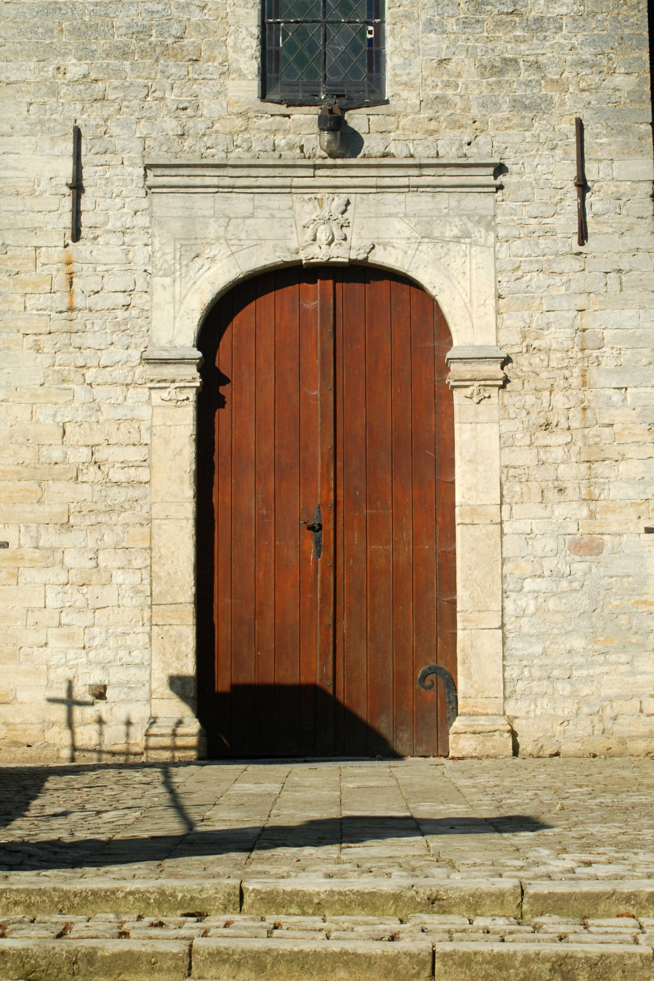 Belgique - Brabant wallon - Jodoigne - Saint-Remy-Geest - Église Saint-Remy